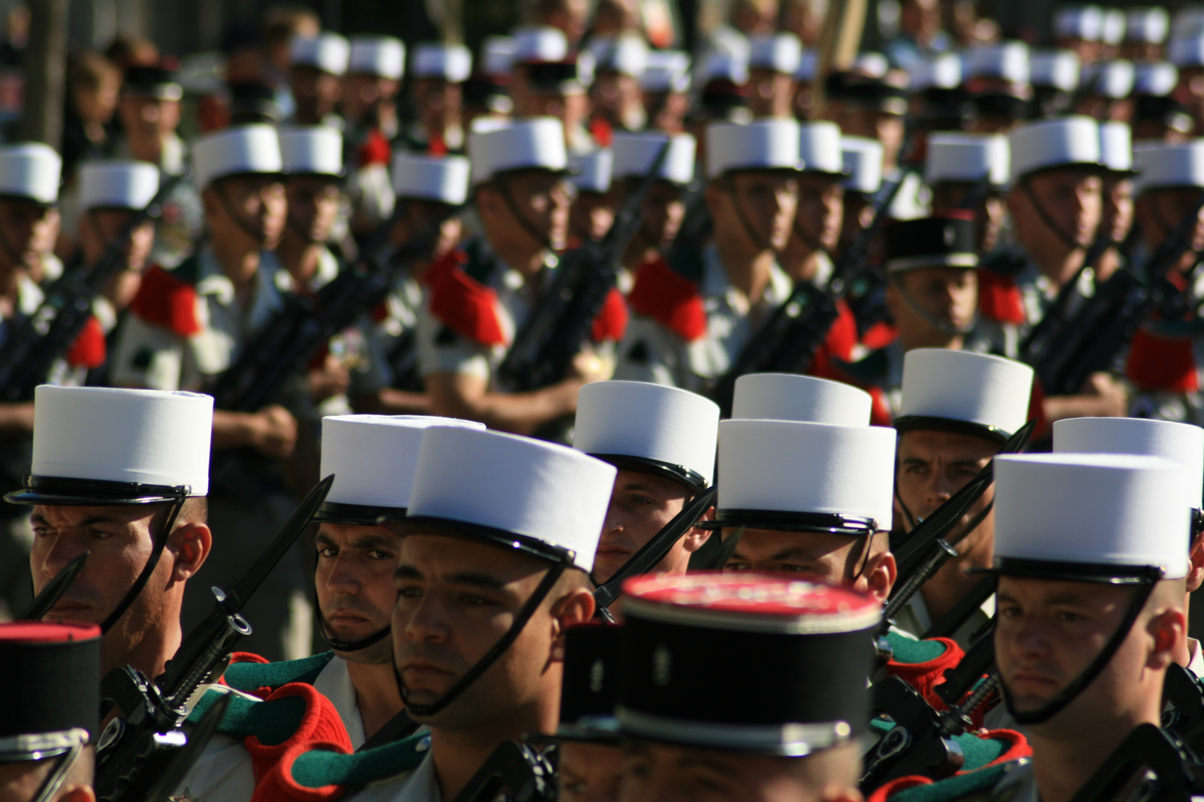 Défilé de la Légion pour commémorer les 40 années de présences dans la ville d'Orange.